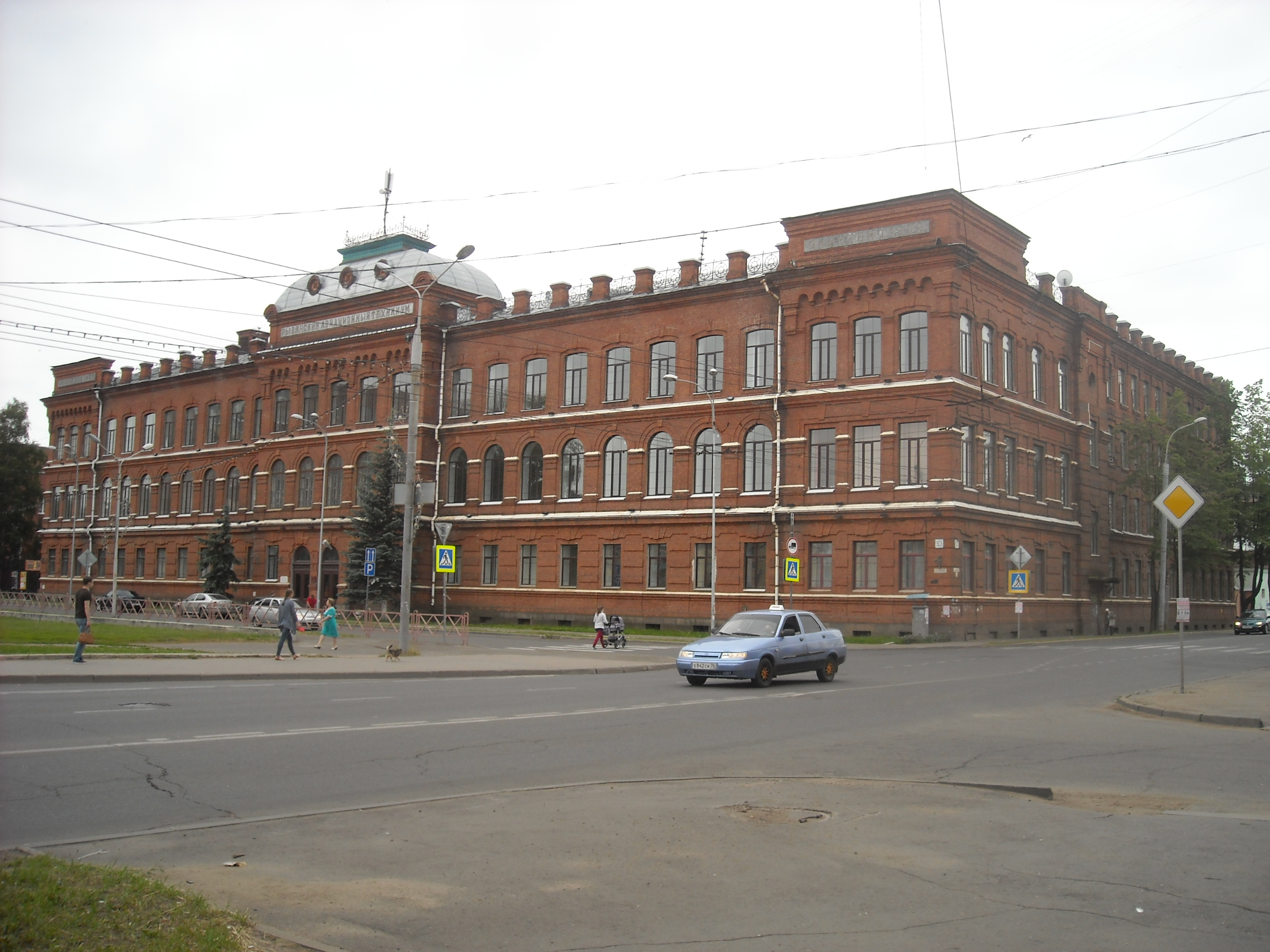 Здание коммерческого училища: улица Чкалова, 93, Рыбинск, Ярославская область